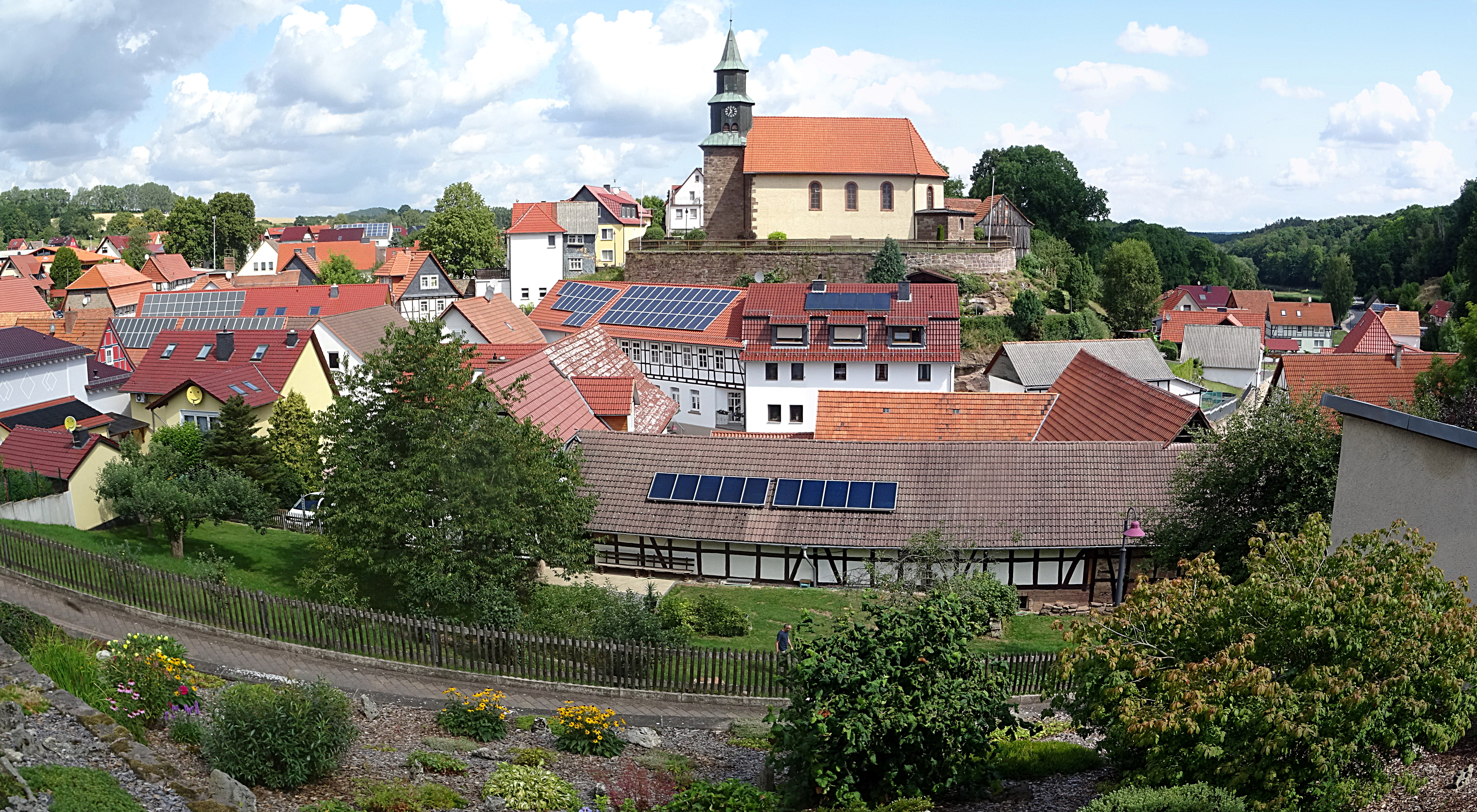 Birkenfelde mit der St.-Leonard-Kirche